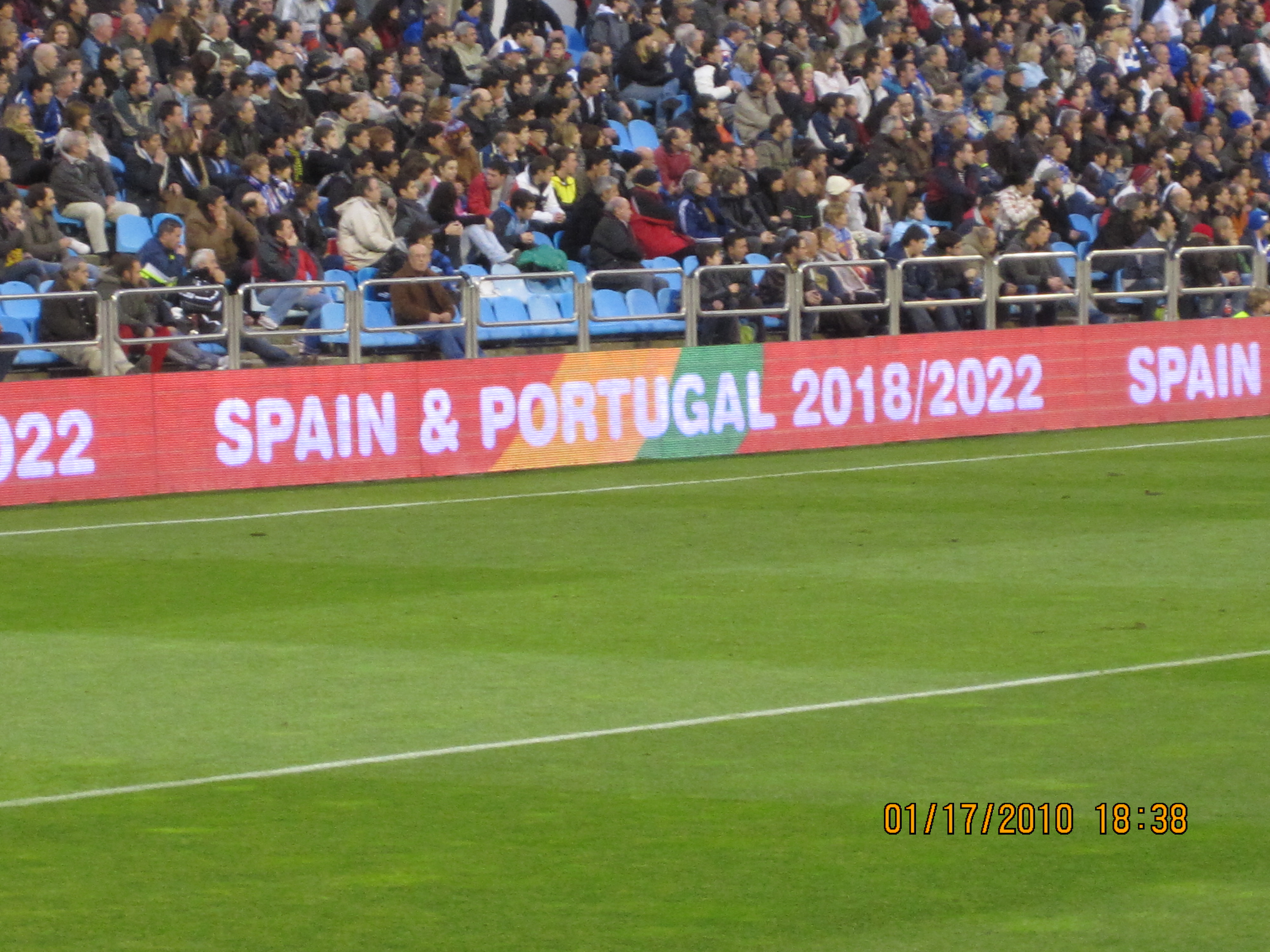 Cartel-anuncio de la Candidatura.